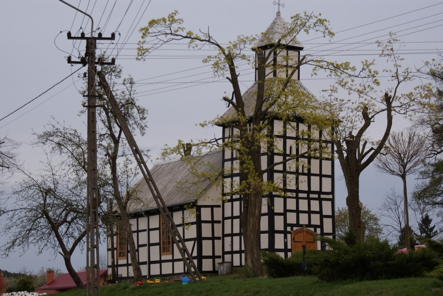 Kołacz - szachulcowy kościół pw. Karola Boremeusza (zabytek nr rejestr. A-482)